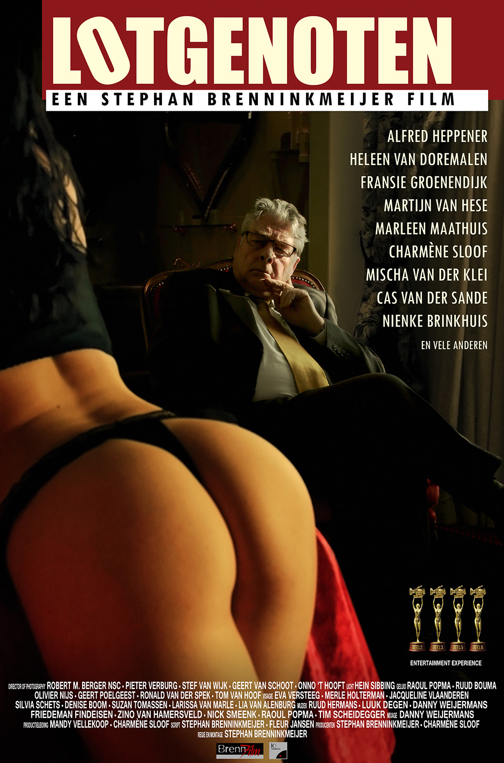 Filmposter van de film "Lotgenoten"